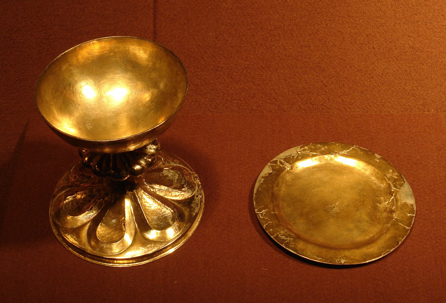 Bremer Dom (Museum): Kelch und Patene, Norddeutschland, Bremen (?), um oder nach 1400